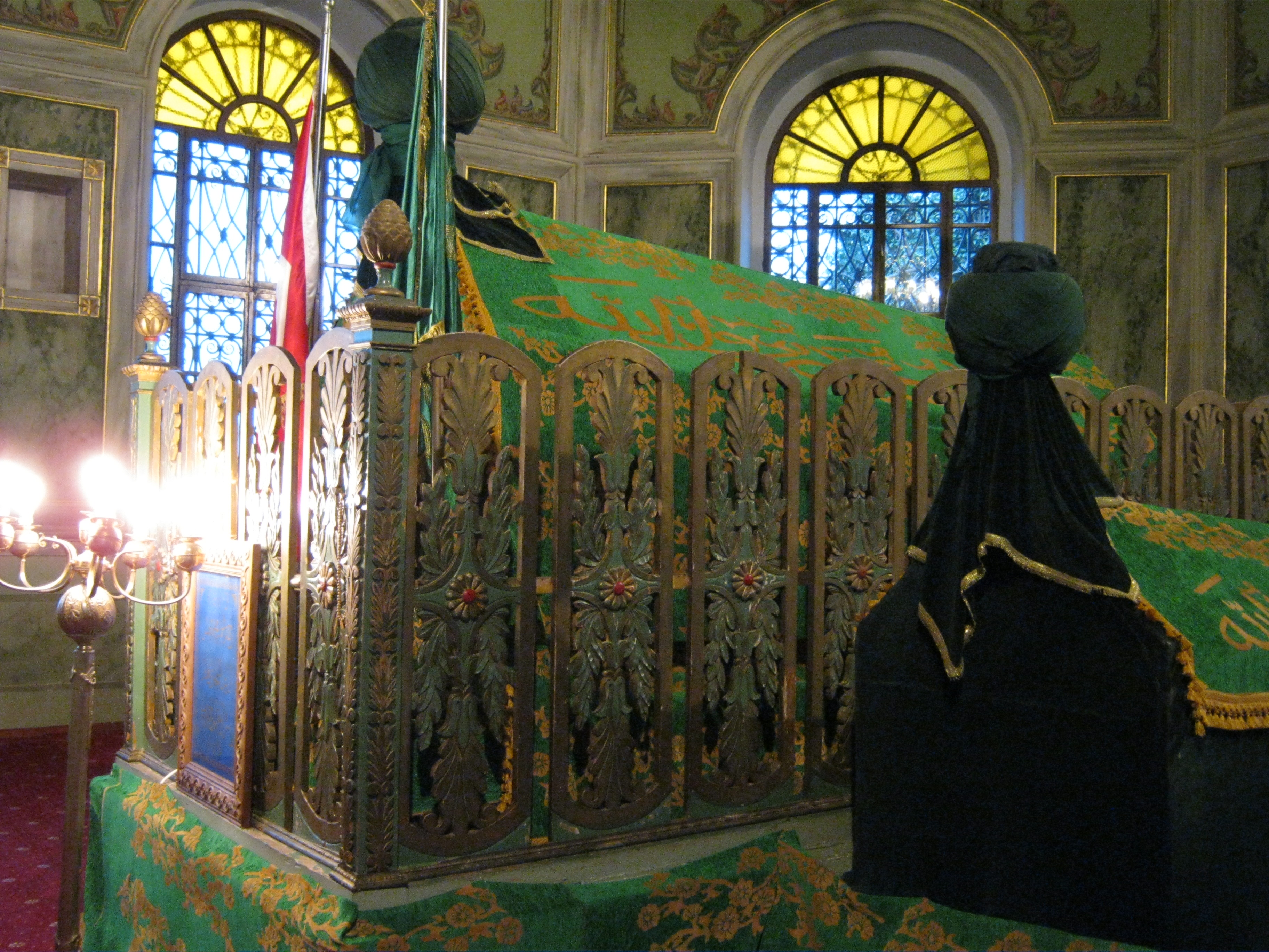 emirsultan türbesi bursa